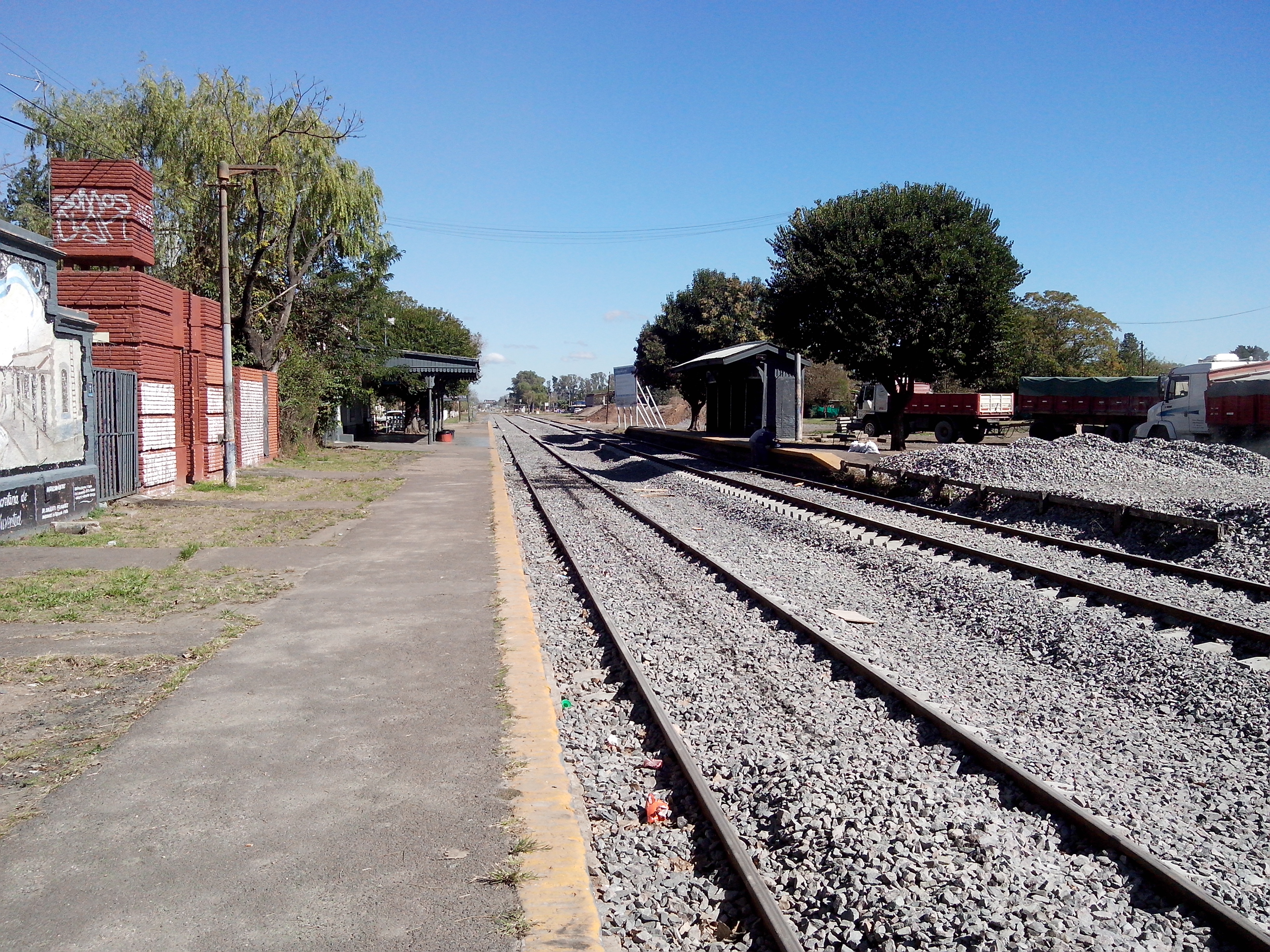 Estación Mariano Acosta en el año 2015.